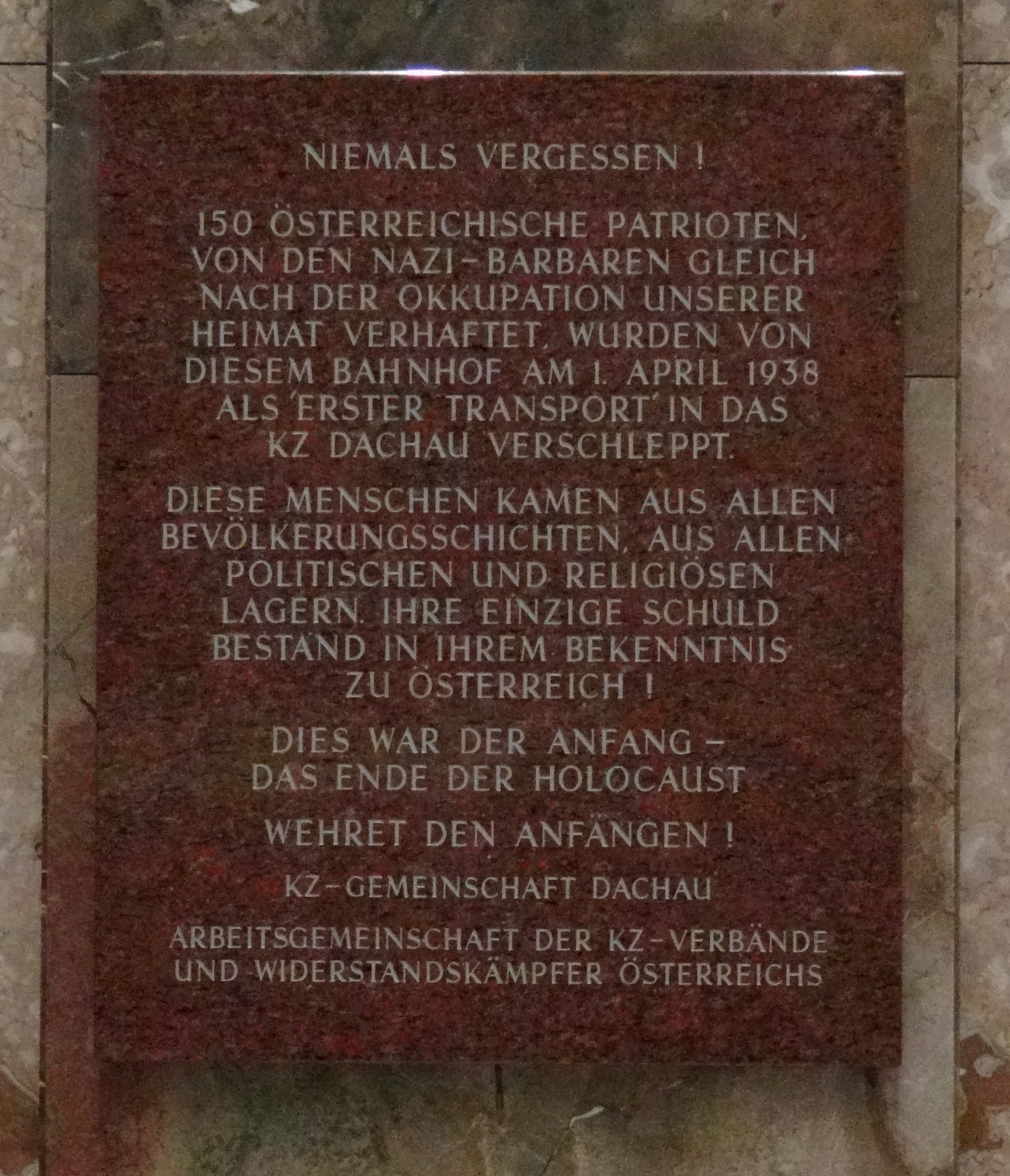 Gedenktafel in der Bahnsteighalle des Westbahnhofs in Wien